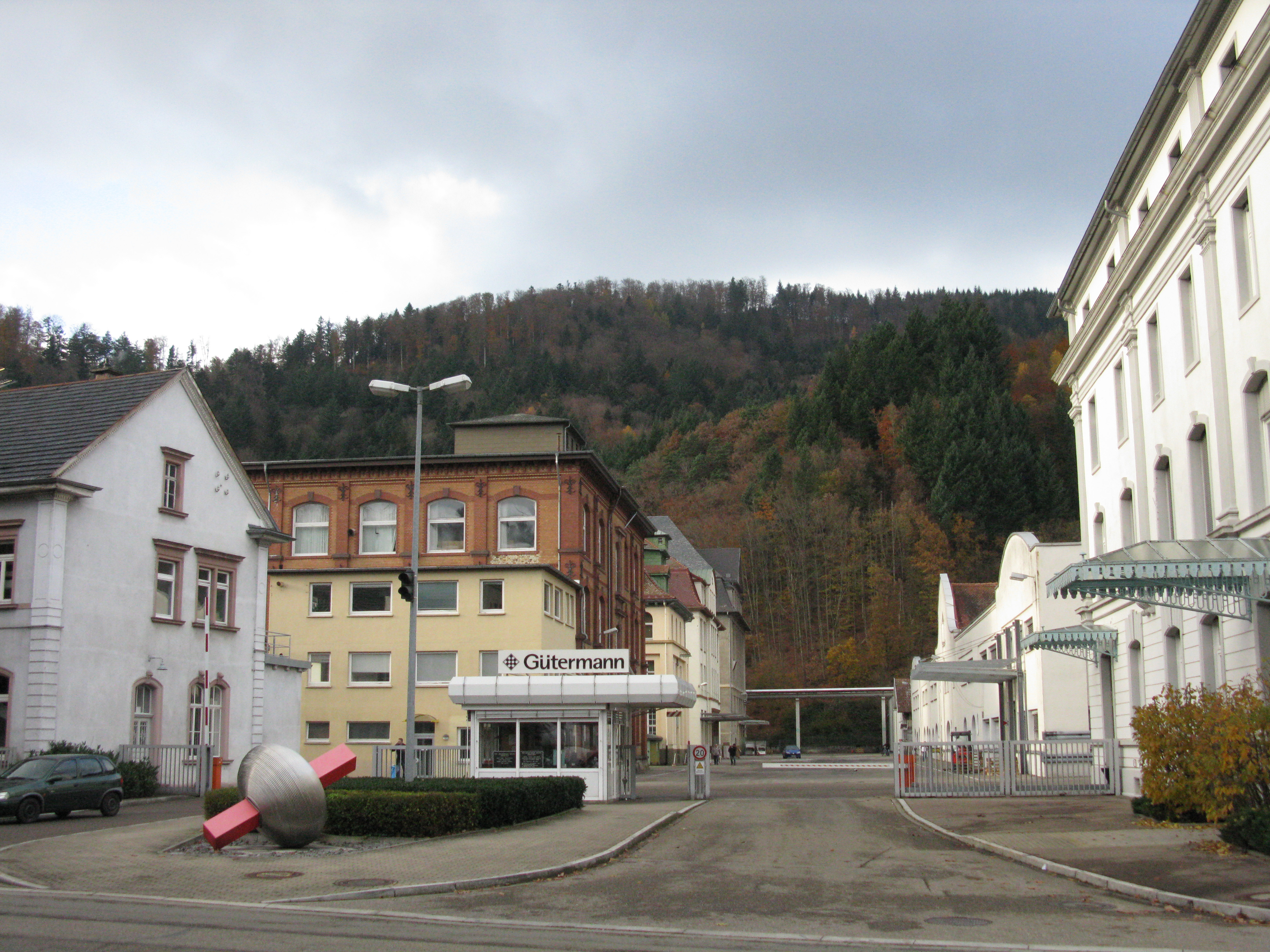 Werkseinfahrt der Firma Gütermann in Gutach mit Kunstobjekt "Spule" von Susanne Immer, 2007